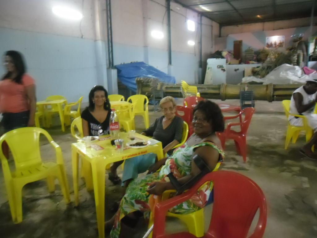 Presidente Edna Santiago, na quadra do GRES Esperança do Amanhã, em 07-01-2012.